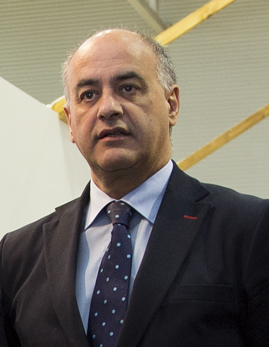 Fotografía: Ángel Cantero | 29-11-2014 - En el acto que ha tenido lugar en el stand institucional de Castilla y León, dentro de la feria de turismo interior INTUR que se celebra en Valladolid, se ha presentado el cartel de la nueva edición extraordinaria de Las Edades del Hombre. Un dibujo del artista Eduardo Palacios es el motivo elegido para anunciar la nueva muestra dedicada a Santa Teresa de Jesús, que se desarrollará de forma simultánea entre las localidades de Ávila y Alba de Tormes. En palabras del Secretario General de la FEH el cartel de esta edición "ha sido uno de los que más dificultad nos ha presentado. Dificultad que obedece fundamentalmente a la enorme cantidad de representaciones que se han creado en torno a Santa Teresa hasta el momento". El motivo central elegido por el dibujante abulense representa un hábito que parece elevarse en sentido místico y al cual acompaña una pluma, en clara referencia a la doctora de la iglesia. La nueva exposición que llevará por título "Teresa de Jesús, maestra de Oración", tendrá como sedes en la ciudad de Ávila, la Iglesia conventual de Ntra. Sra. de Gracia, la Capilla Mosén Rubí y la Iglesia de San Juan Bautista, mientras que el Alba de Tormes el lugar elegido es la Basílica de Santa Teresa.